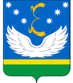 Герб Крыловского района Краснодарского края